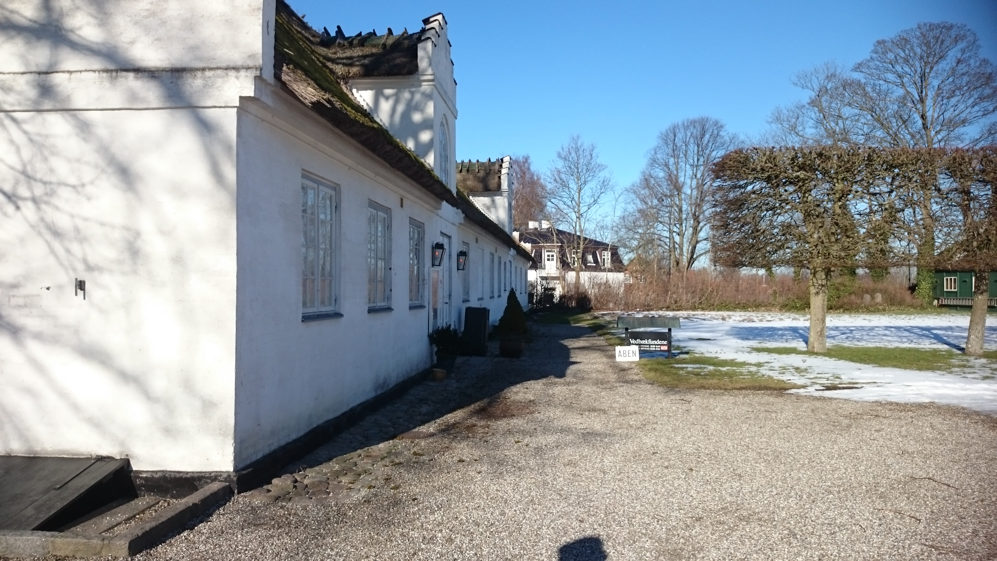 Bygningen med Vedbækfundene